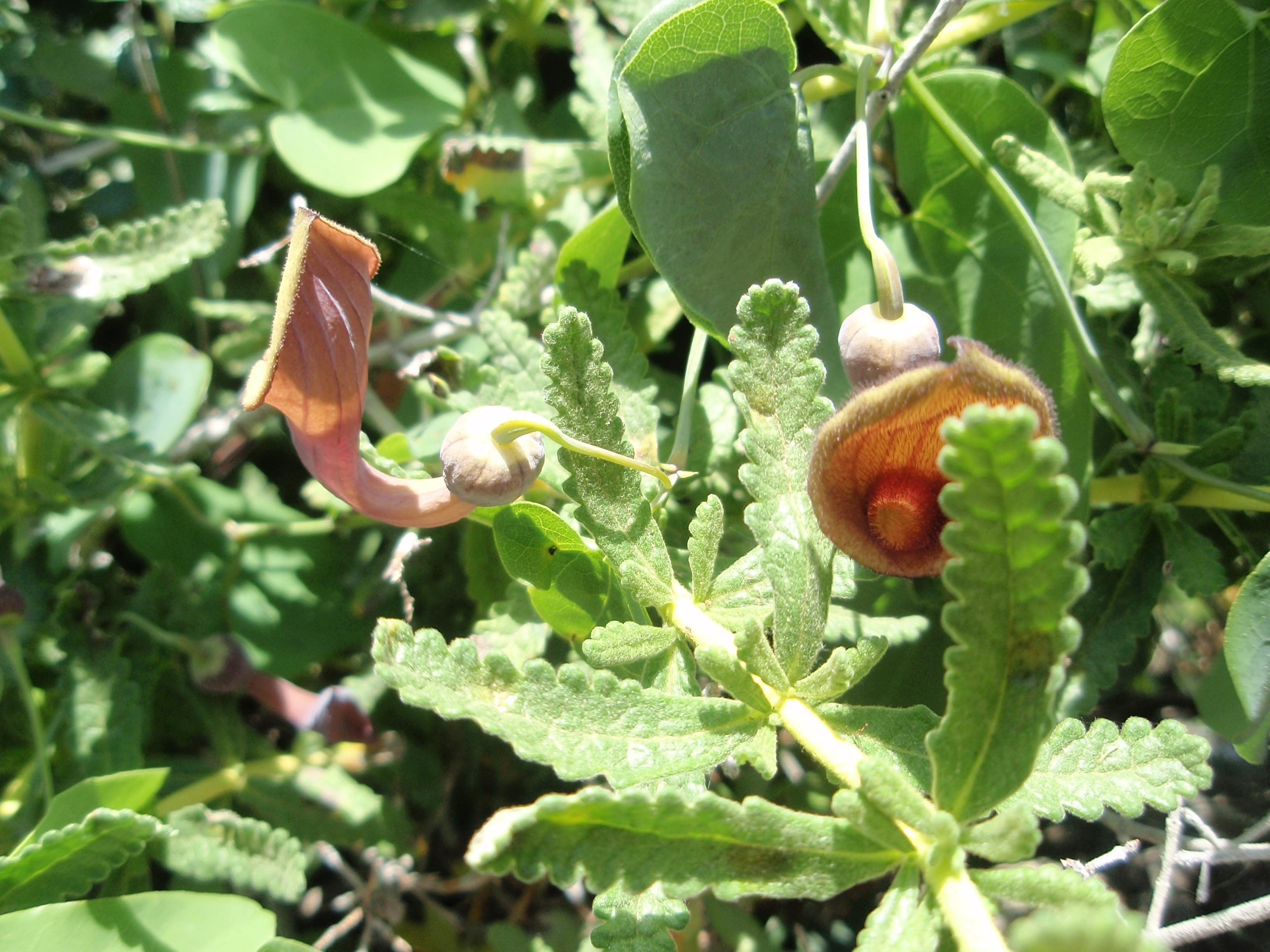 Aristolochia baetica, Gbraltar, Affenfelsen